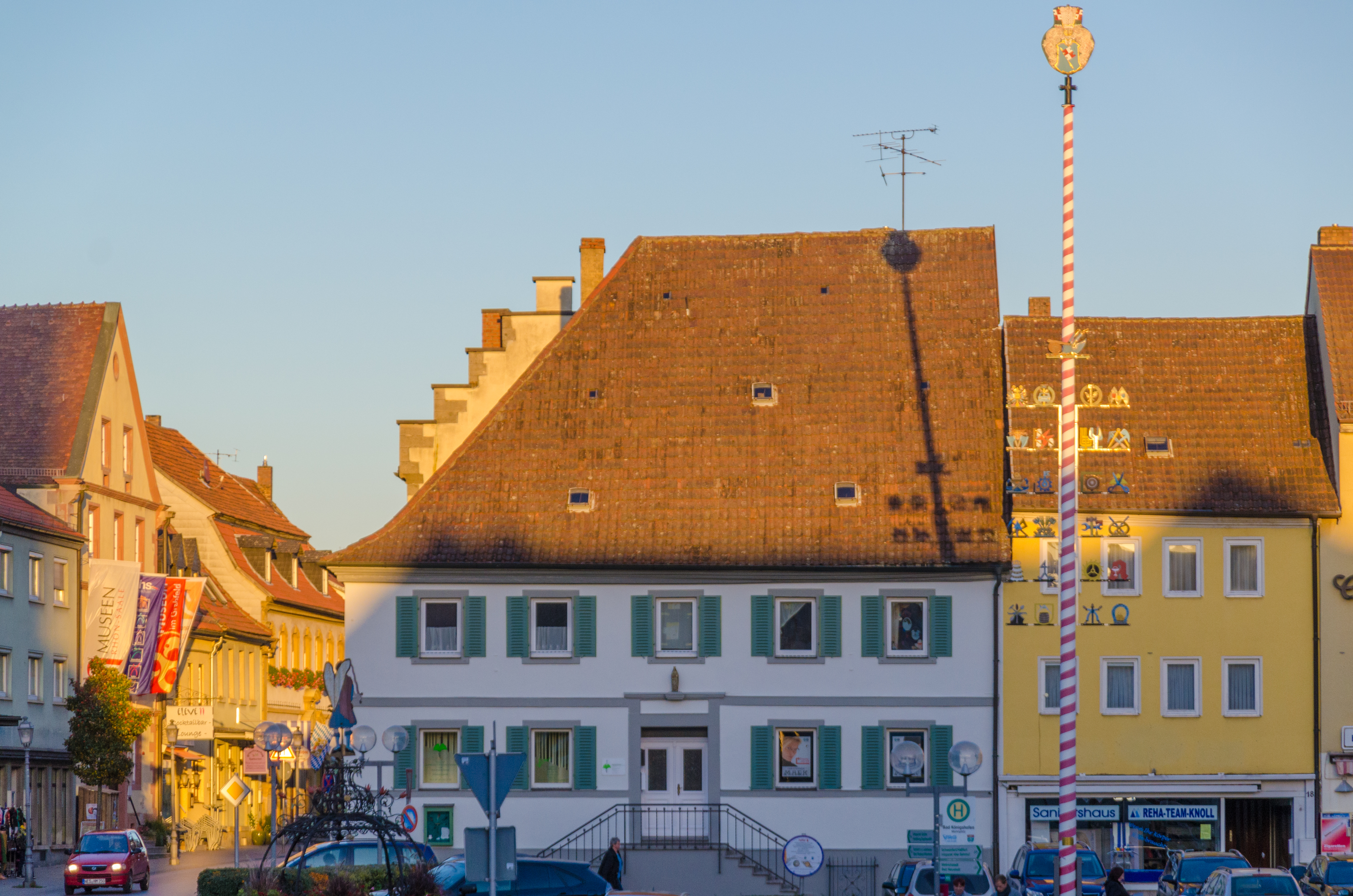 Bad Königshofen im Grabfeld, Marktplatz 20